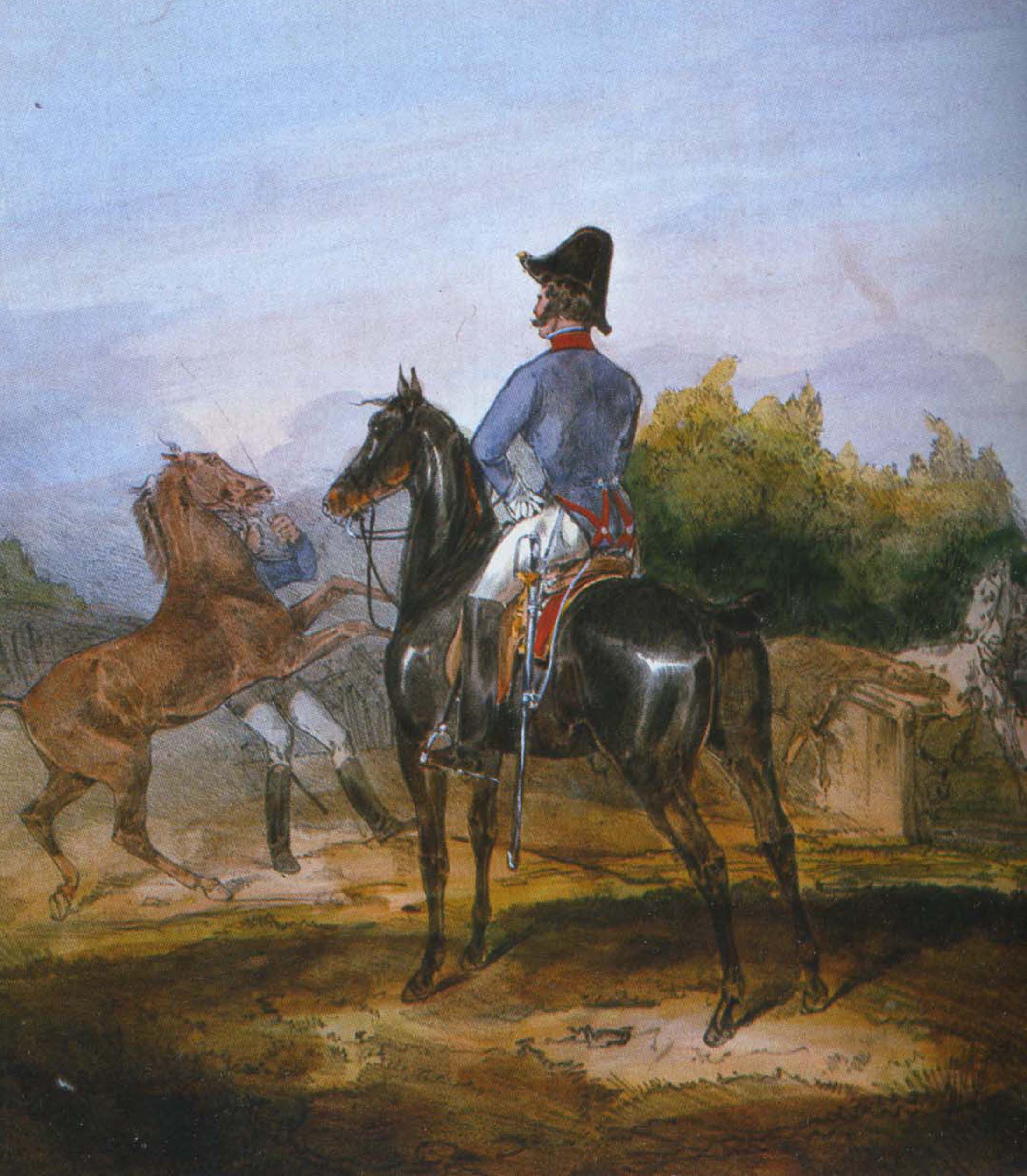 k.k. Remontenoffizier